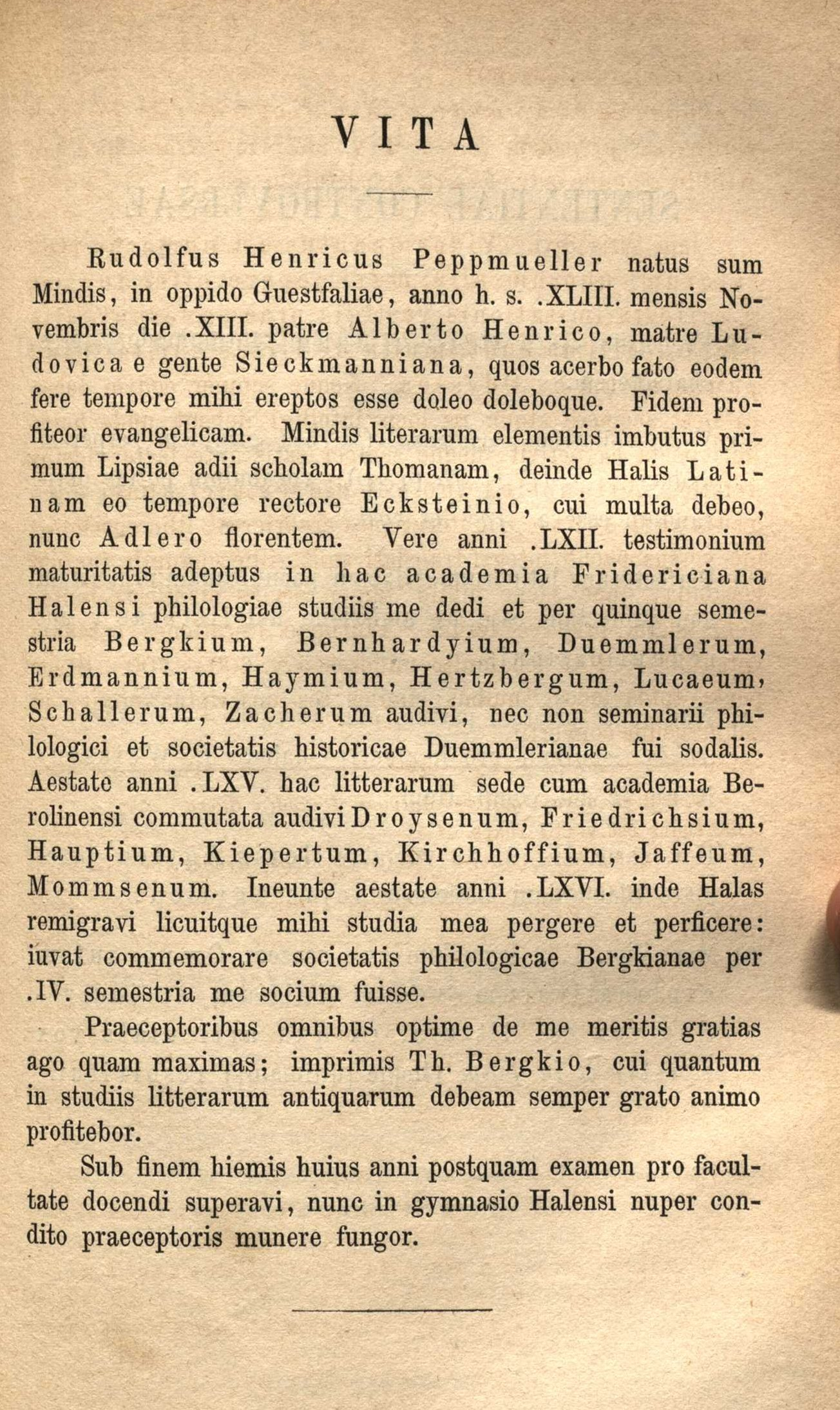 Lebenslauf des Klassischen Philologen Rudolf Peppmüller in seiner Doktordissertation: De extrema Iliadis rhapsodia I. De versibus iteratis, Halle 1868, S. 51